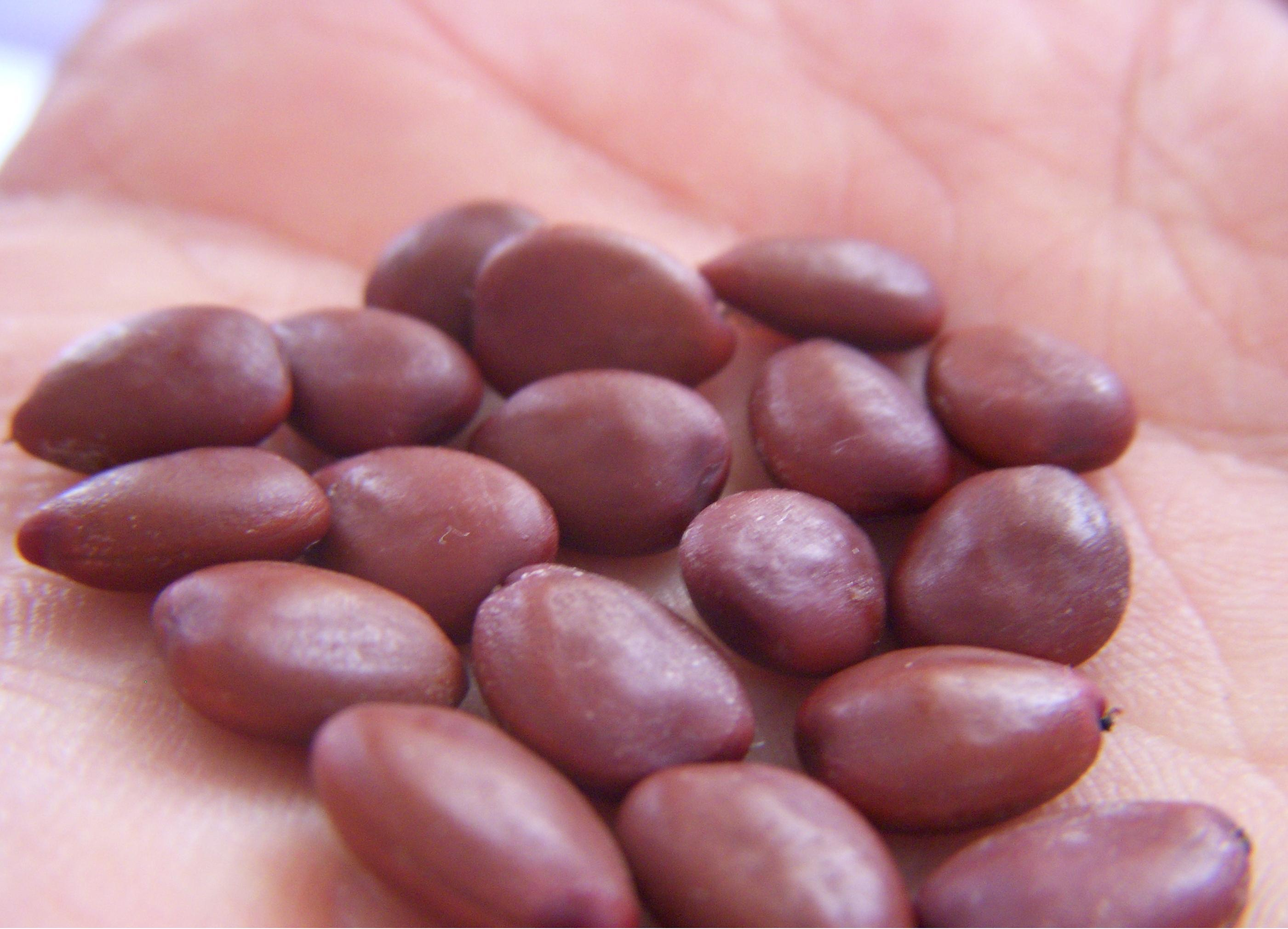 Keçiboynuzu